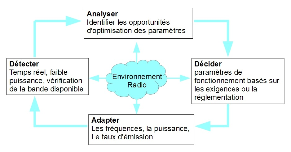 Nouvelle version ( moins de bordure)